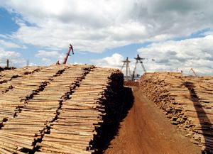 Новоенисейский лесохимический комплекс ЛХК